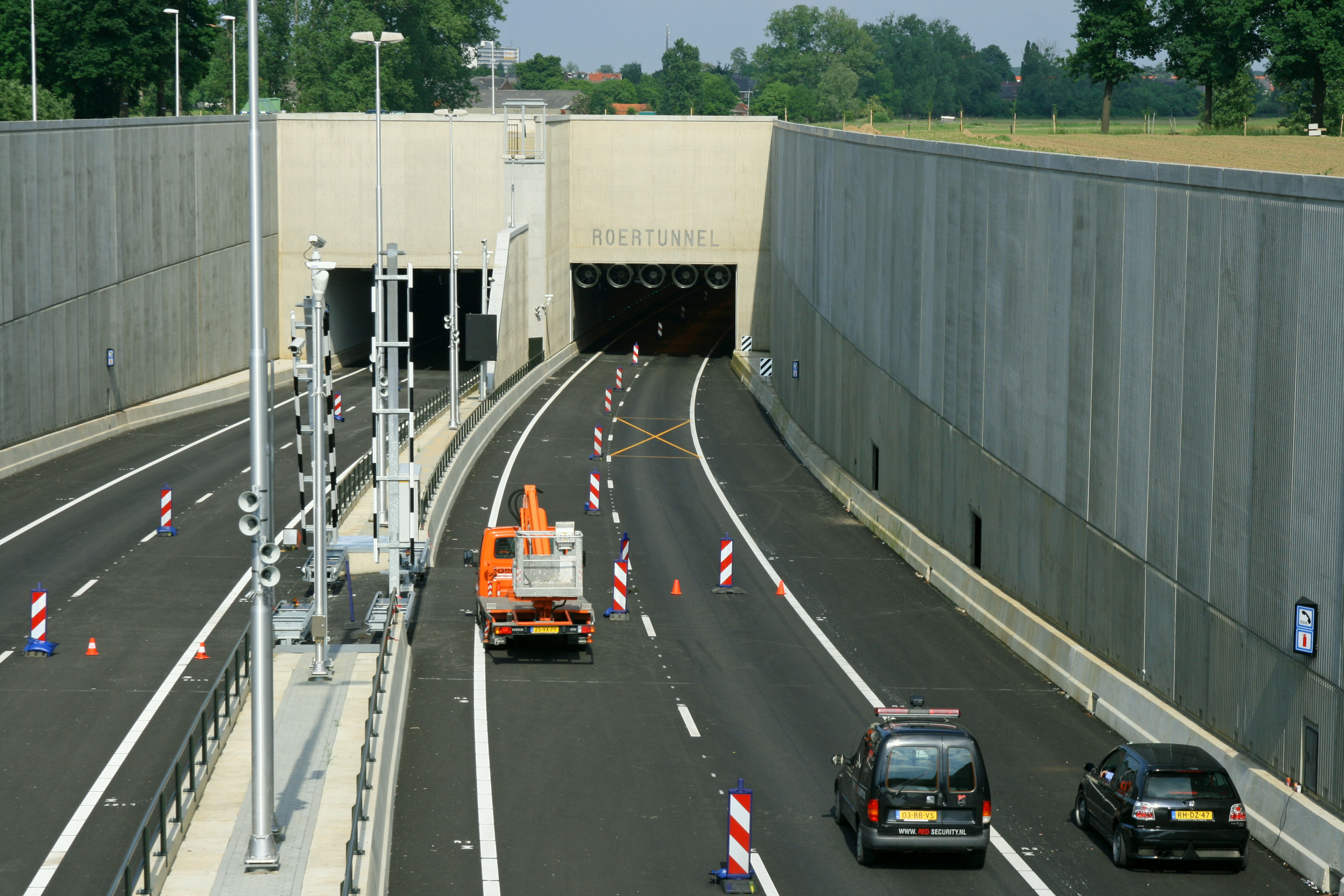 Entrance to Roertunnel